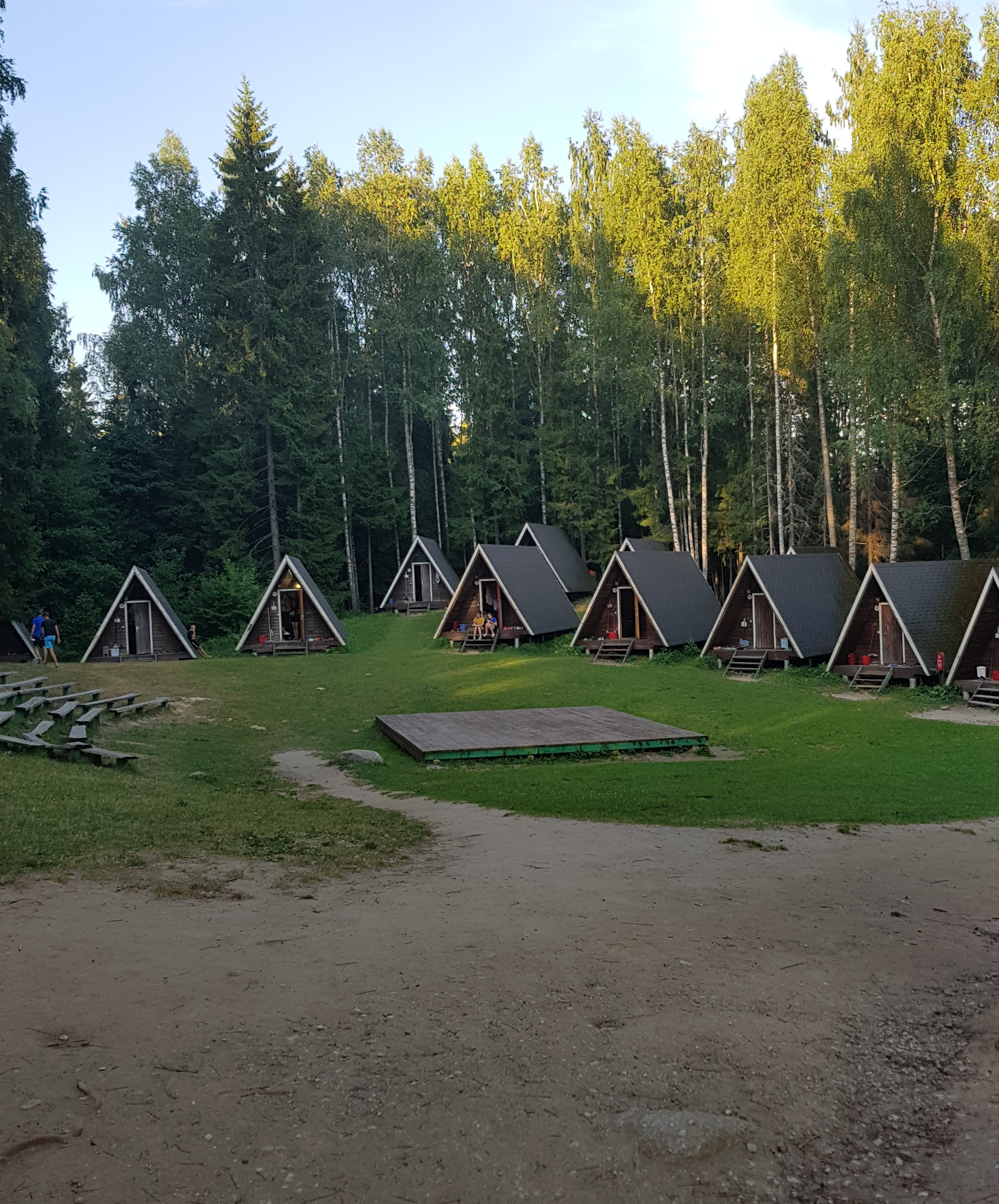 Osa Kurgjärve spordibaasi majutusest